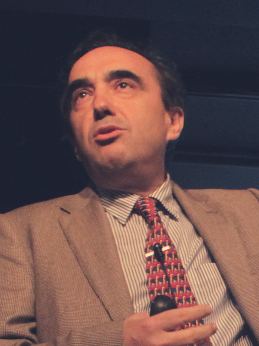 Florentino Rodao, historiador. フロレンティーノ・ロダオ氏の講演会